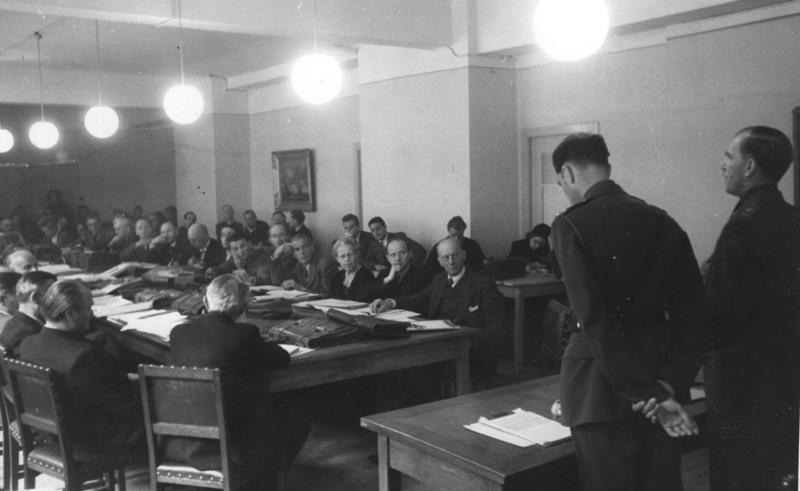 Erste Sitzung des neuen Zonenbeirates in Hamburg. In seiner neuen Zusammensetzung trat der Zonenbeirat der britischen Zone unter dem Vorsitz von Minister Franz Blücher am 11.6.47 im früheren Gebäude der Militärregierung in der Esplanade zu seiner ersten Sitzung zusammen. Der stellvertr. Militärgouverneur der britischen Zone, General Sir Brian Robertson, empfahl den deutschen Vertretern eine beschleunigte Erledigung des britischen Vorschlages der Bodenreform. Unser Bild zeigt General Sir Brian Robertson bei seinen Ausführungen vor dem Zonenbeirat am 11.6.47.